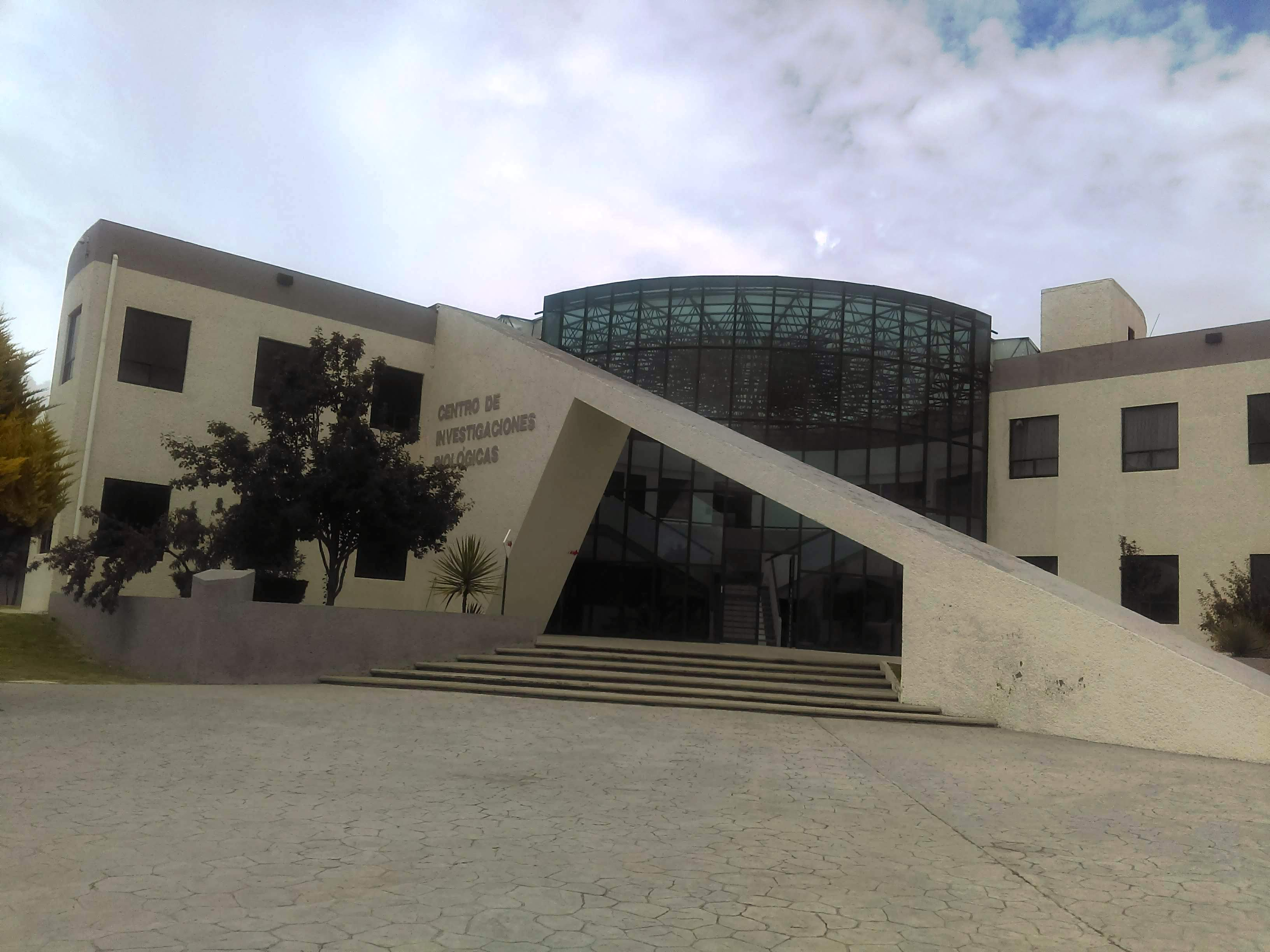 Ciudad del Conocimiento de la UAEH.